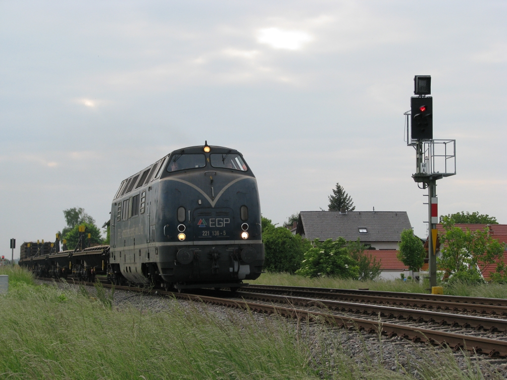 221 136 der EGP mit einem Schwellenzug in Monsheim auf dem Weg nach Worms